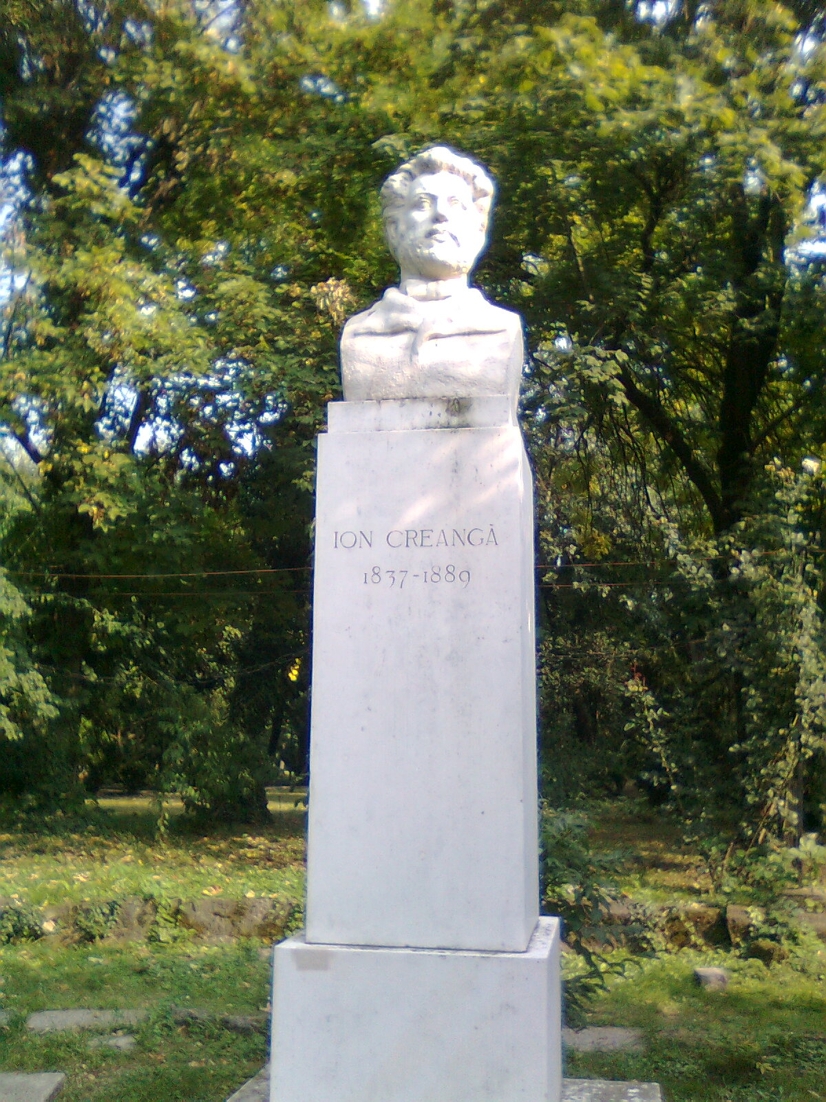 Bustul lui Ion Creanga